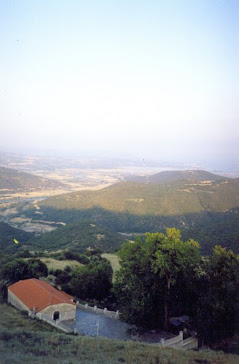 ΠΑΛΑΙΩΝ ΚΑΤΩ ΚΕΡΔΥΛΛΙΩΝ